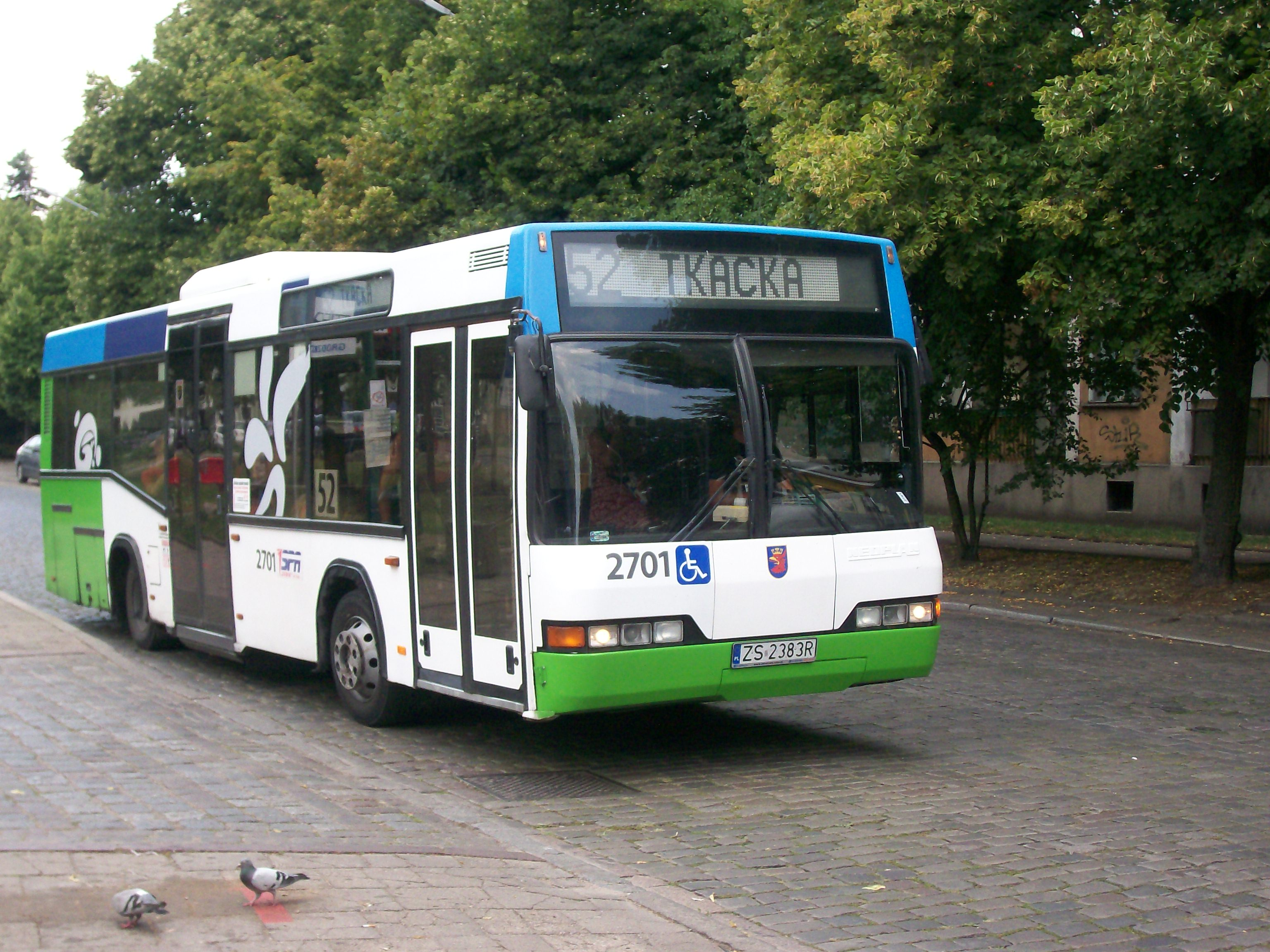 Autobus linii 52 Szczecin